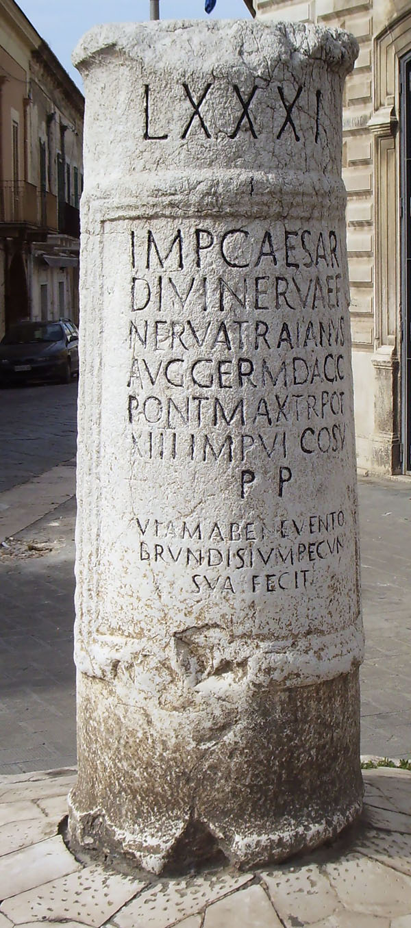 Facciata di Palazzo Ducale.